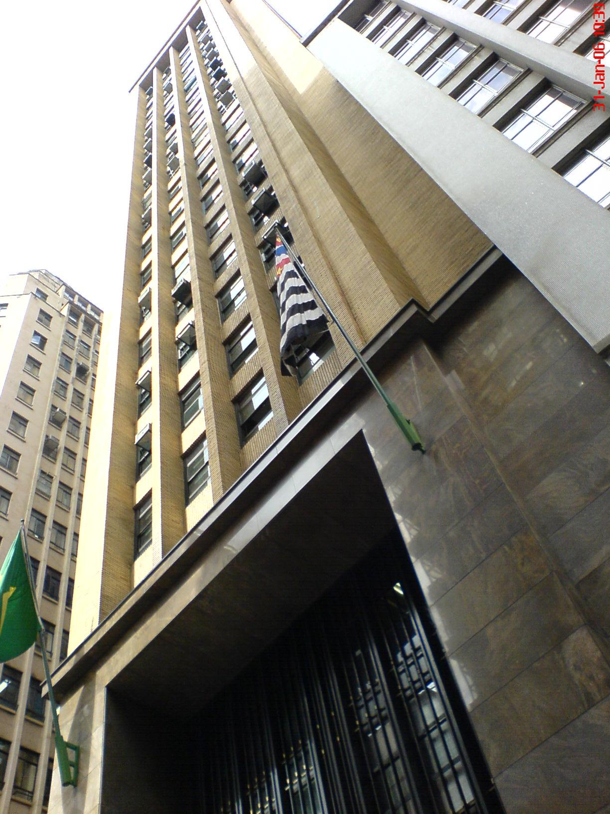 Edifício Altino Arantes, sede do Banco à Rua XV de Novembro, Sao Paul - SP, Brasil